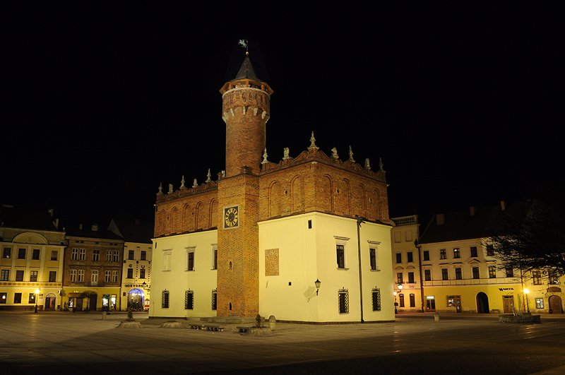 Tarnowski ratusz w nocy